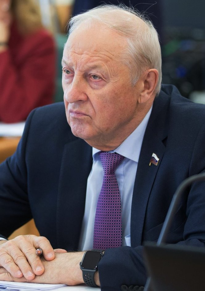 Эдуард Эргартович Россель (род.1937) — российский государственный и политический деятель